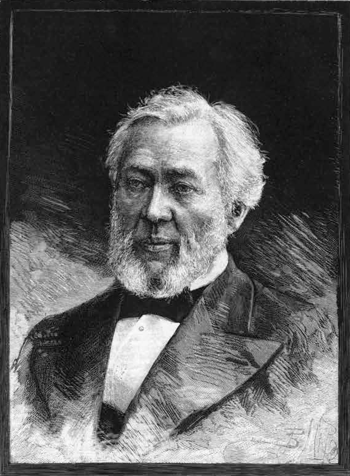 Резанов, Александр Иванович на гравюре для некролога